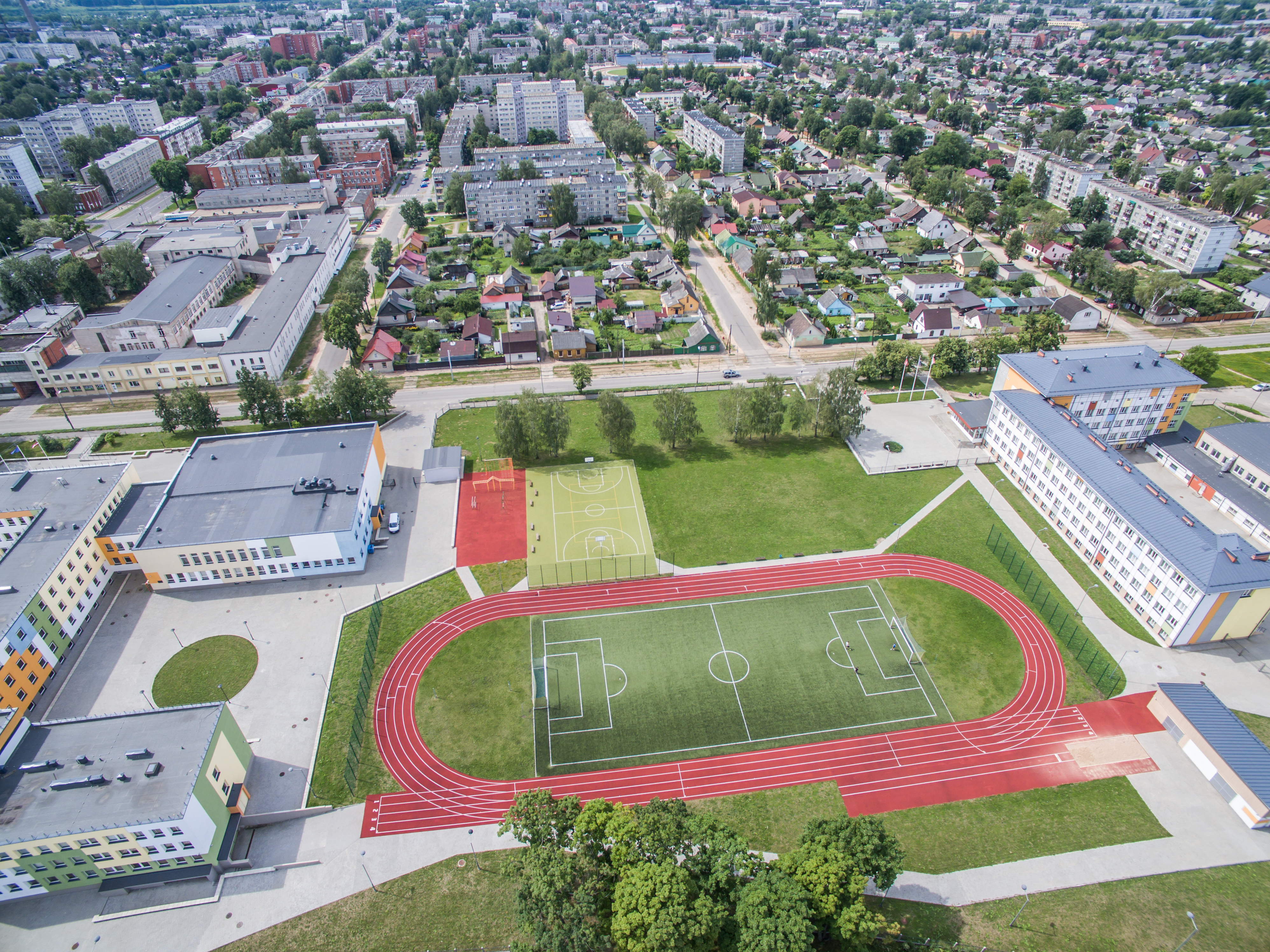 Вид с птичего полета- школа и стадион